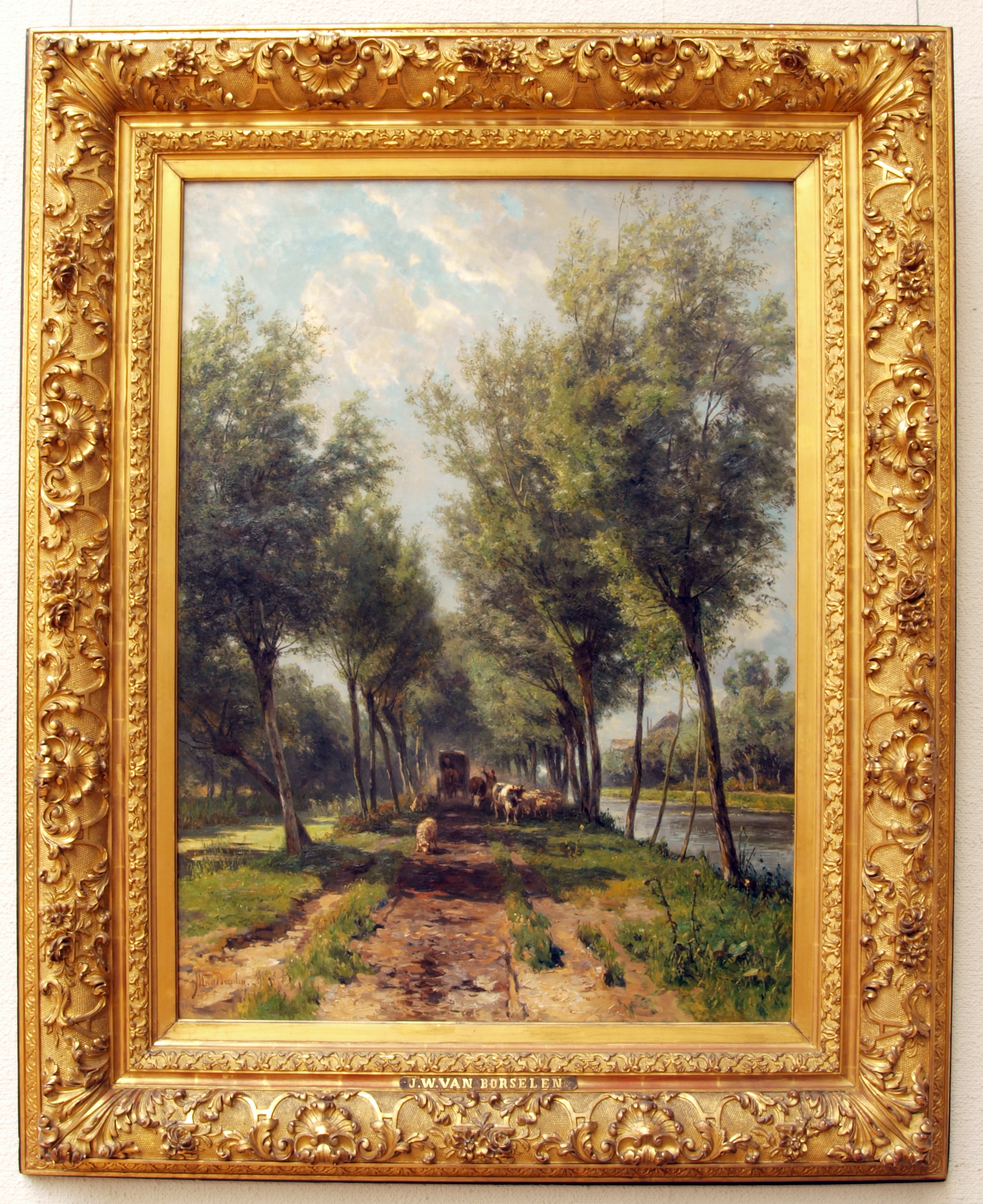 Jan Willem van Borselen (1825-1892), De weg van Polsbroekerdam, 1860, Olieverf op doek.